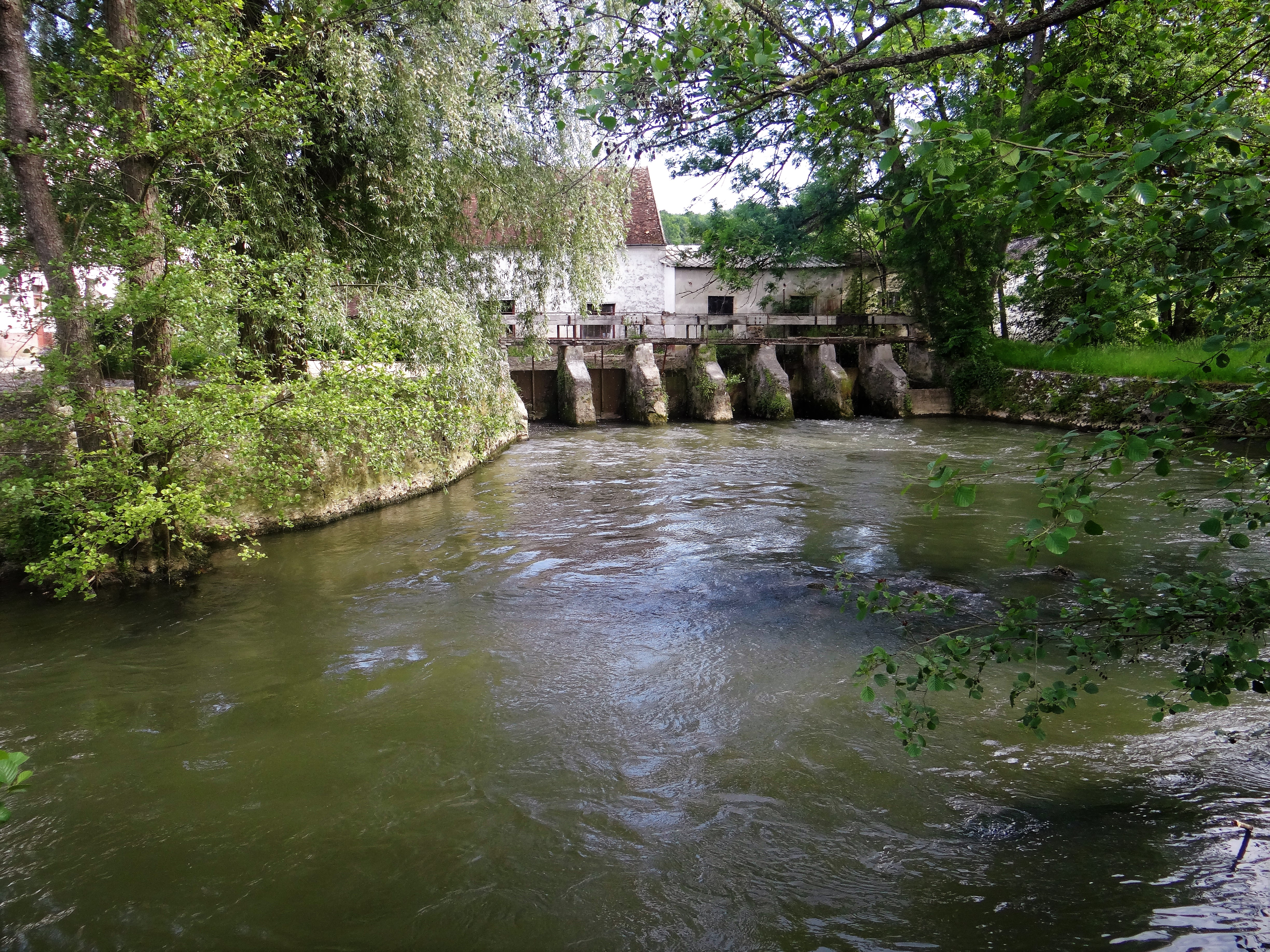 Le petit Morin au moulin de coton à Orly-sur-Morin, Seine-et-Marne, France.